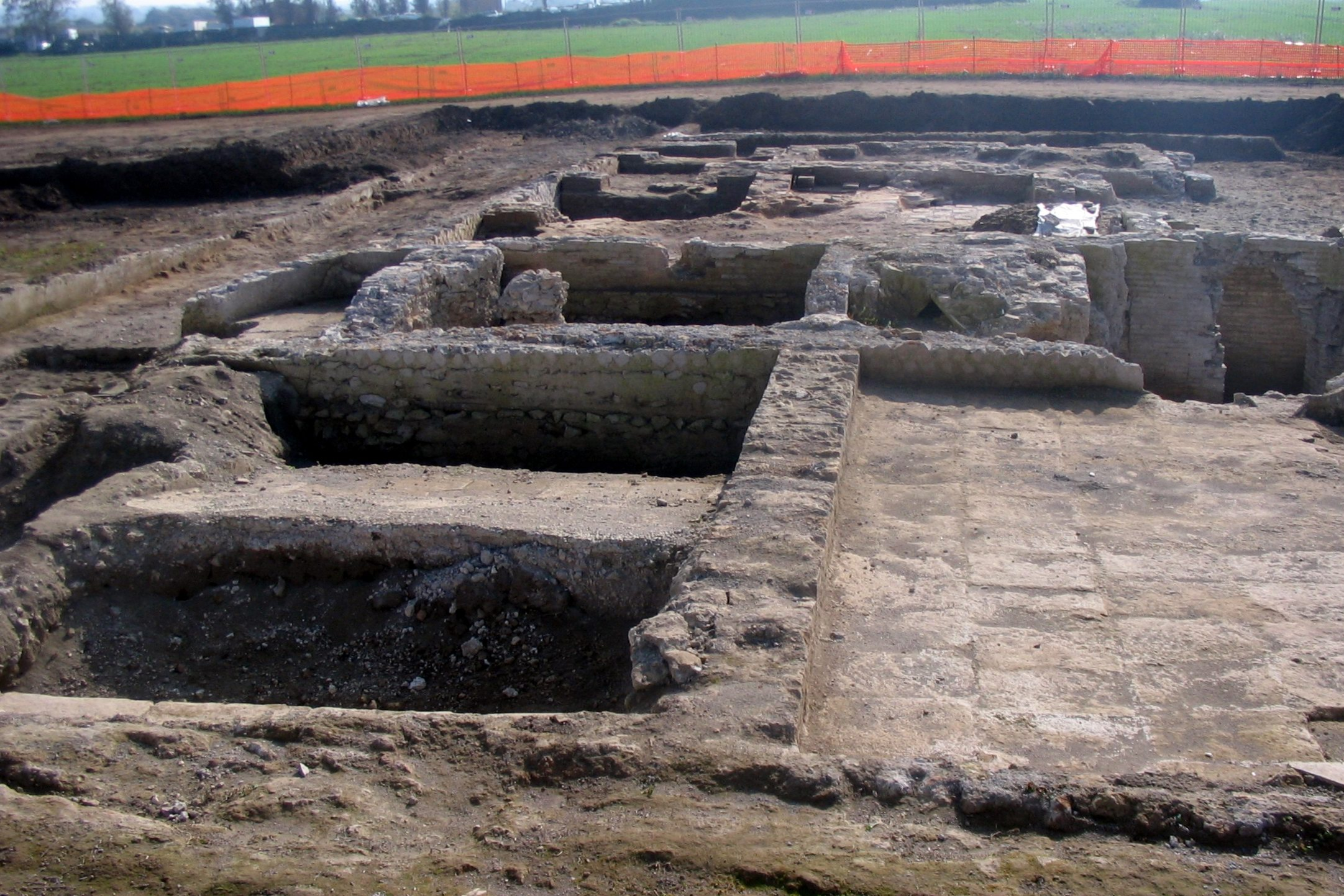 Torvaianica, Lazio, Italia